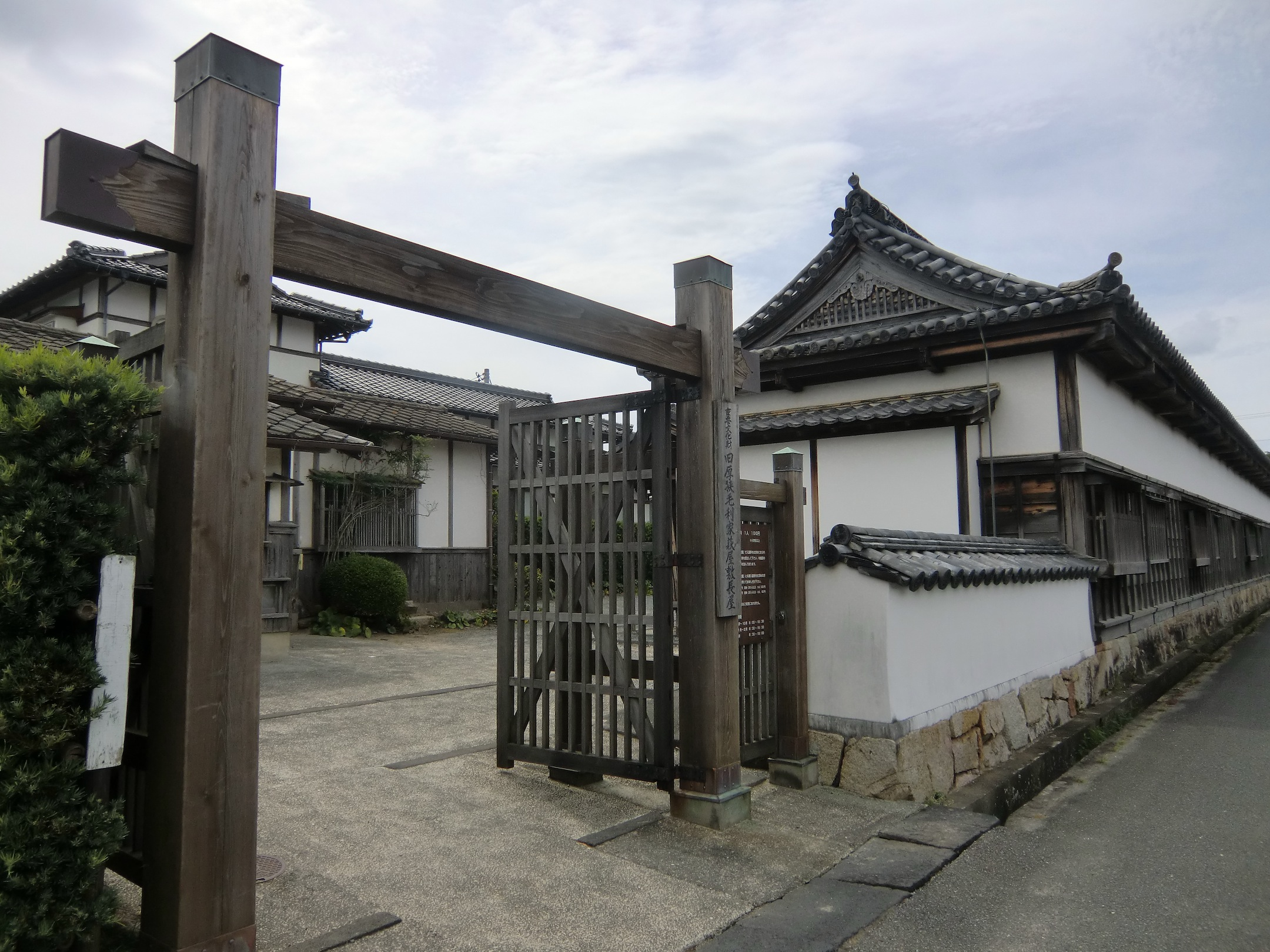 萩城跡指月山公園前の旧厚狭毛利家萩屋敷長屋（萩市）